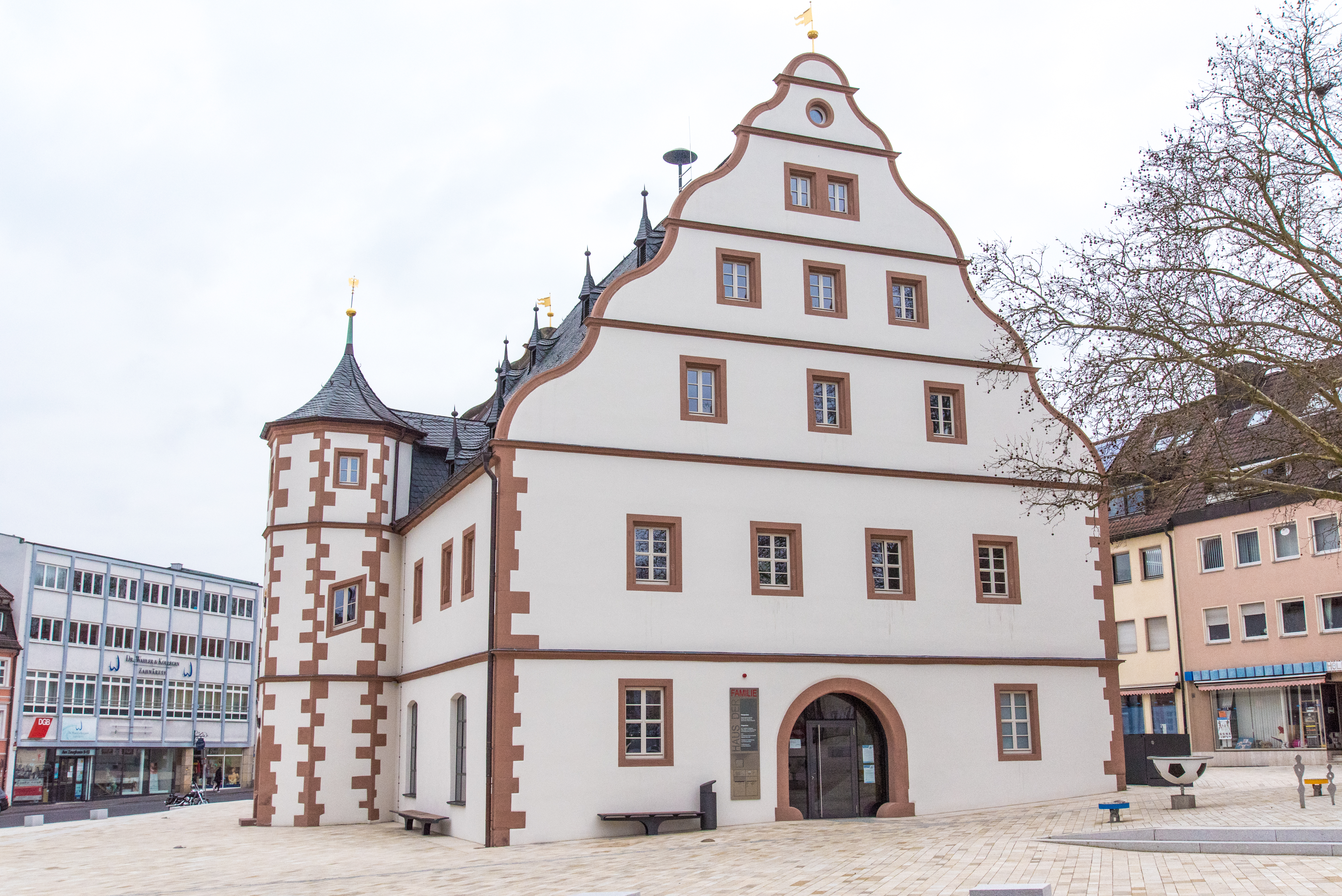 Schweinfurt, Zeughaus